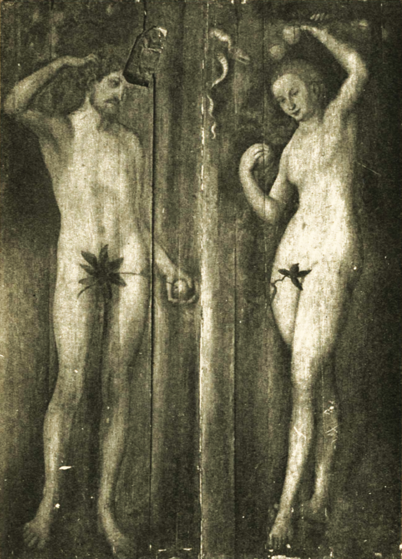 Картина "Адам і Єва" перед реставрацією. Фото з книги "Новознайдений твір Кранаха в Музеї мистецтва Всеукраїнської академії наук" 1929 року